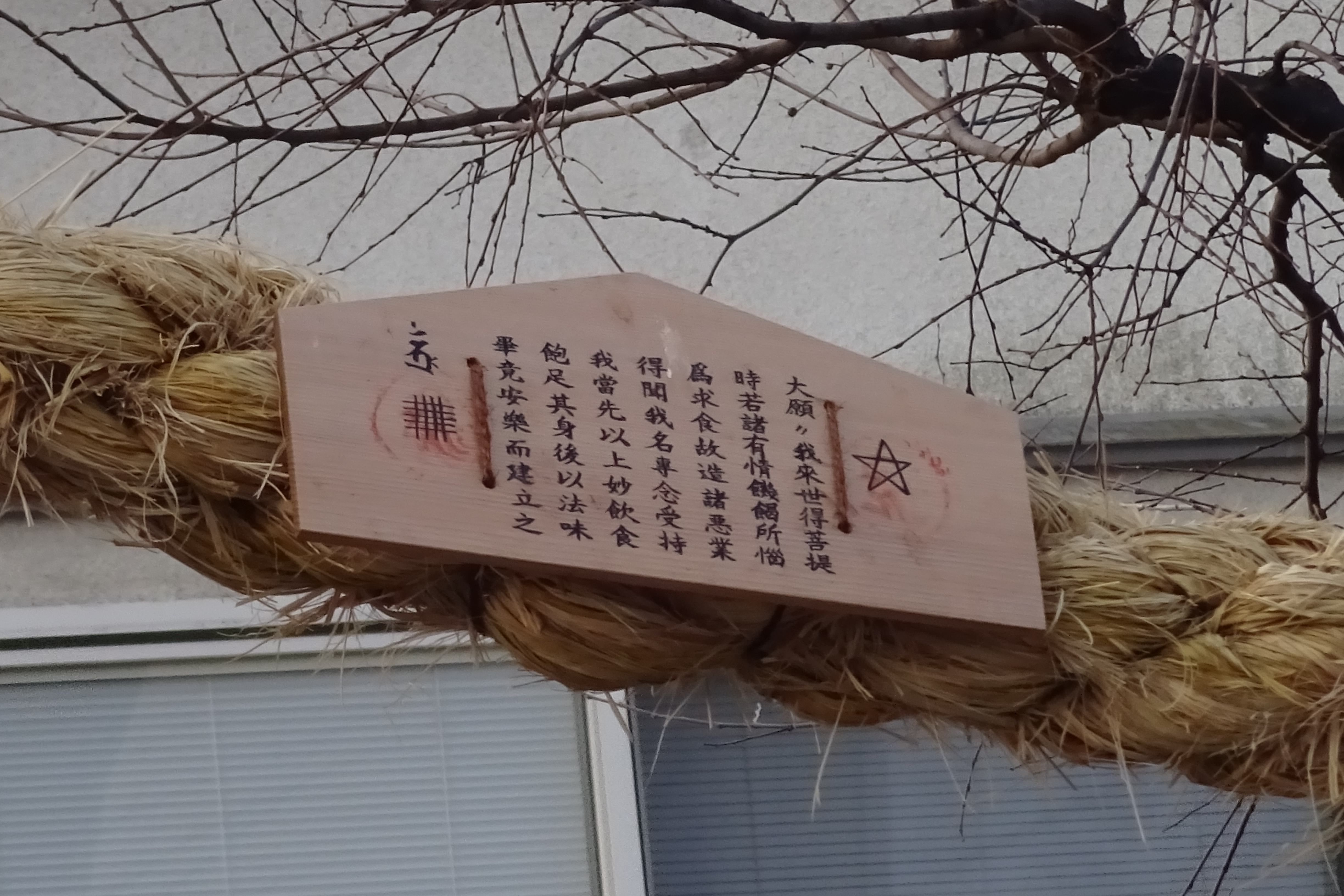 竹田の道切りの木札